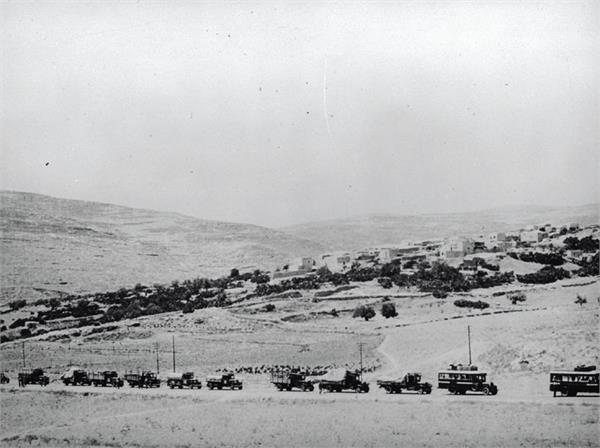 חיפה - שיירה לחיפה ליד הכפר דר-שרף